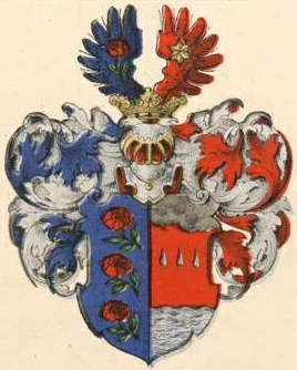 Rosenthali suguvõsa aadlivapp